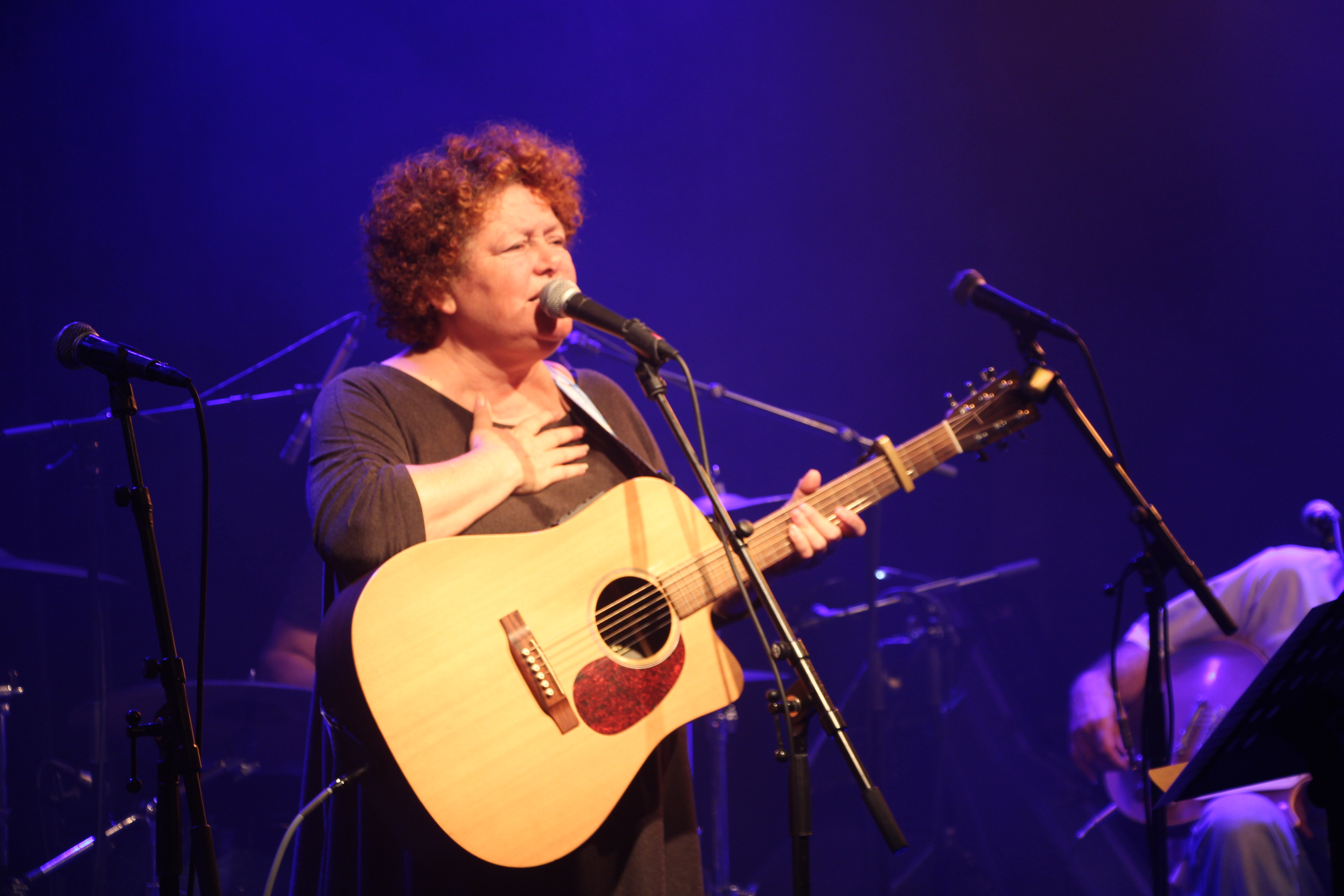 לאה שבת בהופעת השקה לאלבום - זאפה תל-אביב 2015 צילום: עירן רסלר